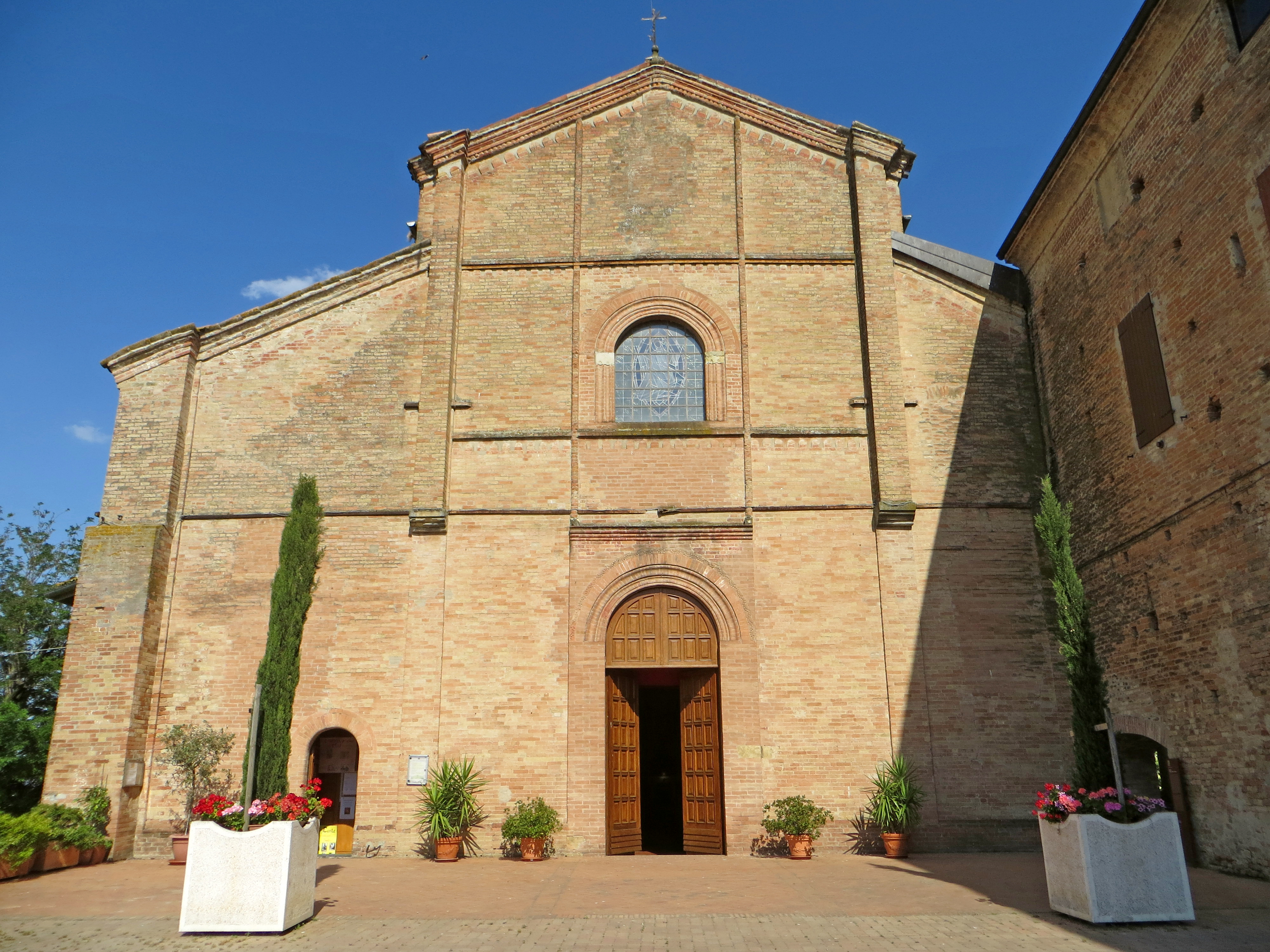 Monastero di Santa Maria Assunta (Castione Marchesi, Fidenza) - facciata della chiesa